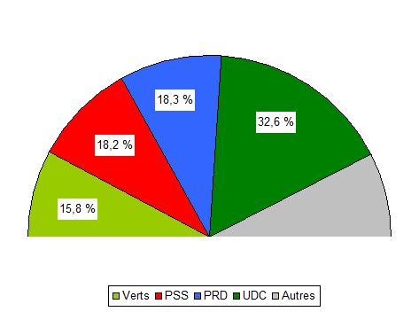 Résultats des élections de 2007 à Meikirch (canton de Berne, Suisse)